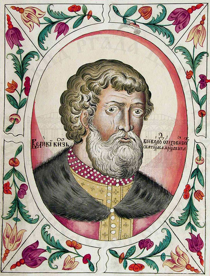 Великий князь киевский Всеволод Ольгович